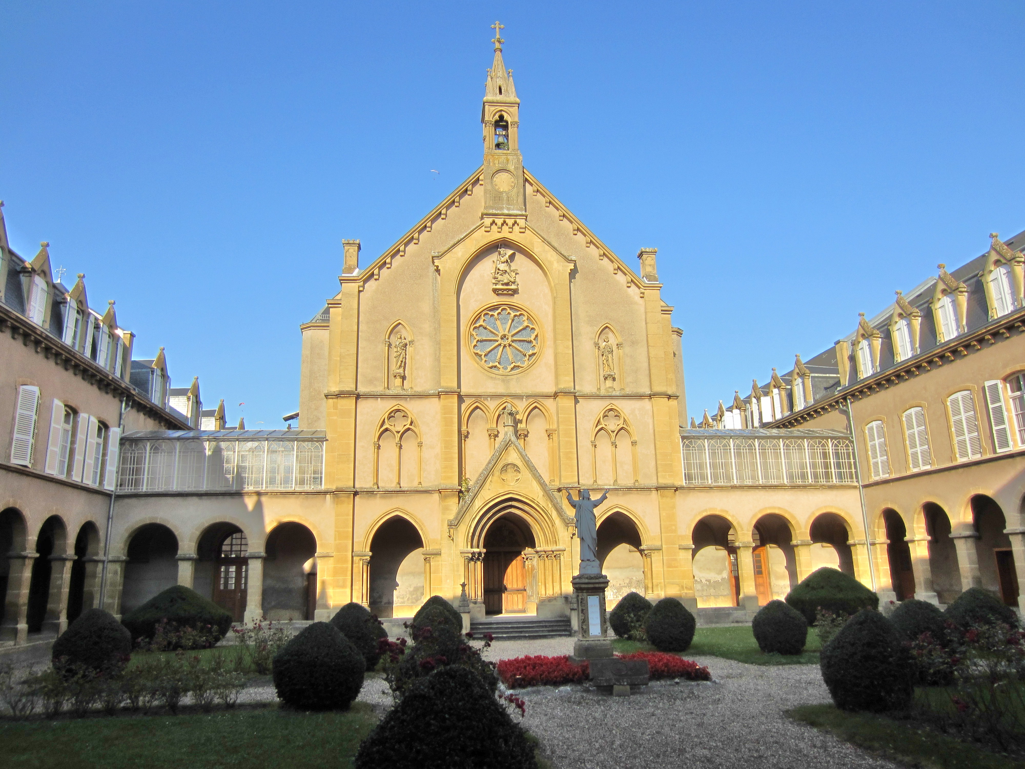 Description chapelle providence couvent Peltre Date30 September 2011Sourcemon appareil photoAuthorAimelaimePermission(Reusing this file) chapelle providence couvent Peltre